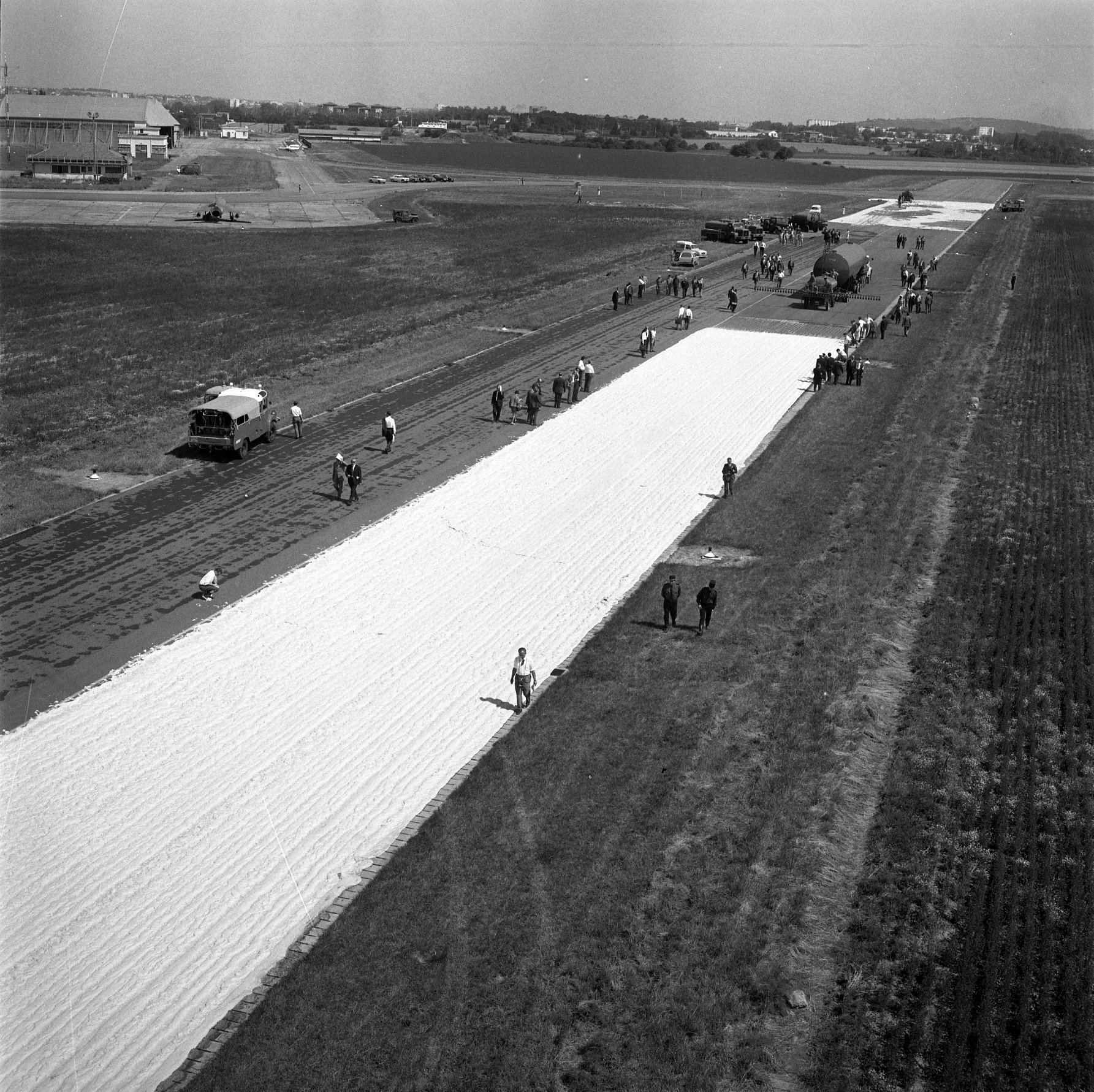 Piste de Blagnac. 22 juin 1967. Vue d'ensemble en plongée d'une piste recouverte de mousse carbonique.